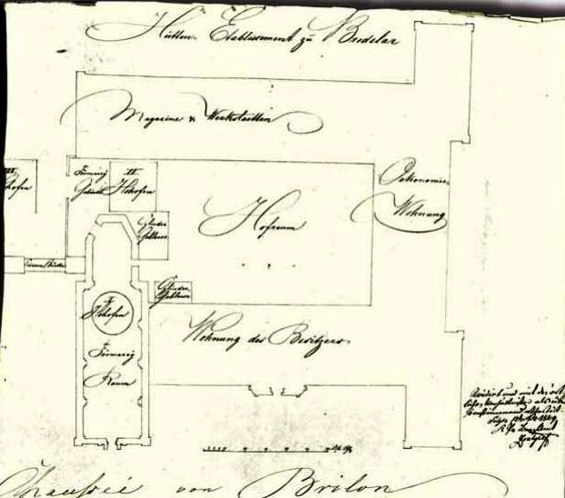 Situationsplan des Hüttenetablissments in Bredelar 1849 (in den Gebäuden des früheren Klosters Bredelar)